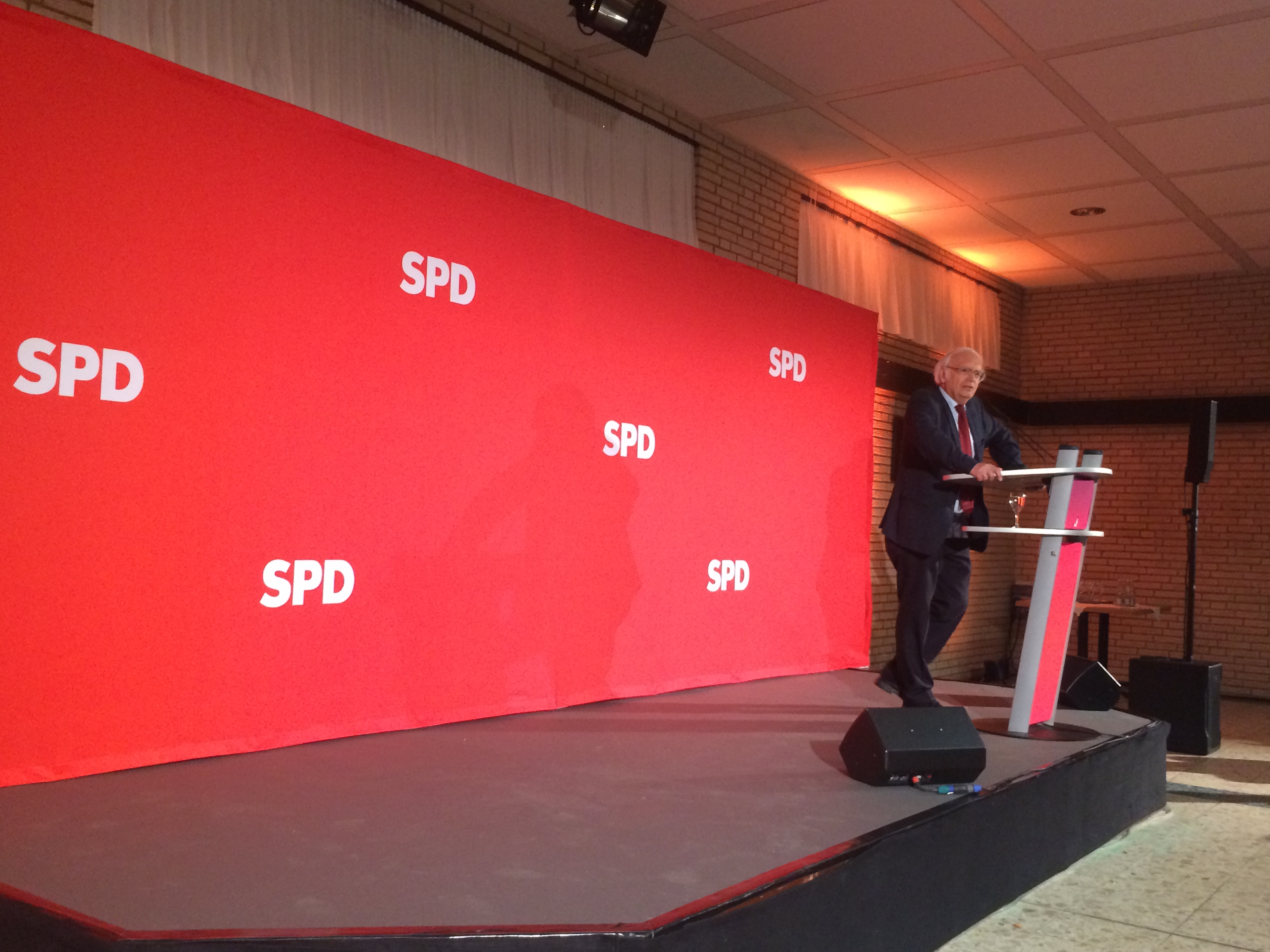 Professor Bernd Faulenbach, Vorsitzender der Historischen Kommission der SPD, spricht am 6. Oktober 2015 zum 70. Jahrestag der Wennigser Konferenz. Calenberger Hof, Wennigsen (Deister).